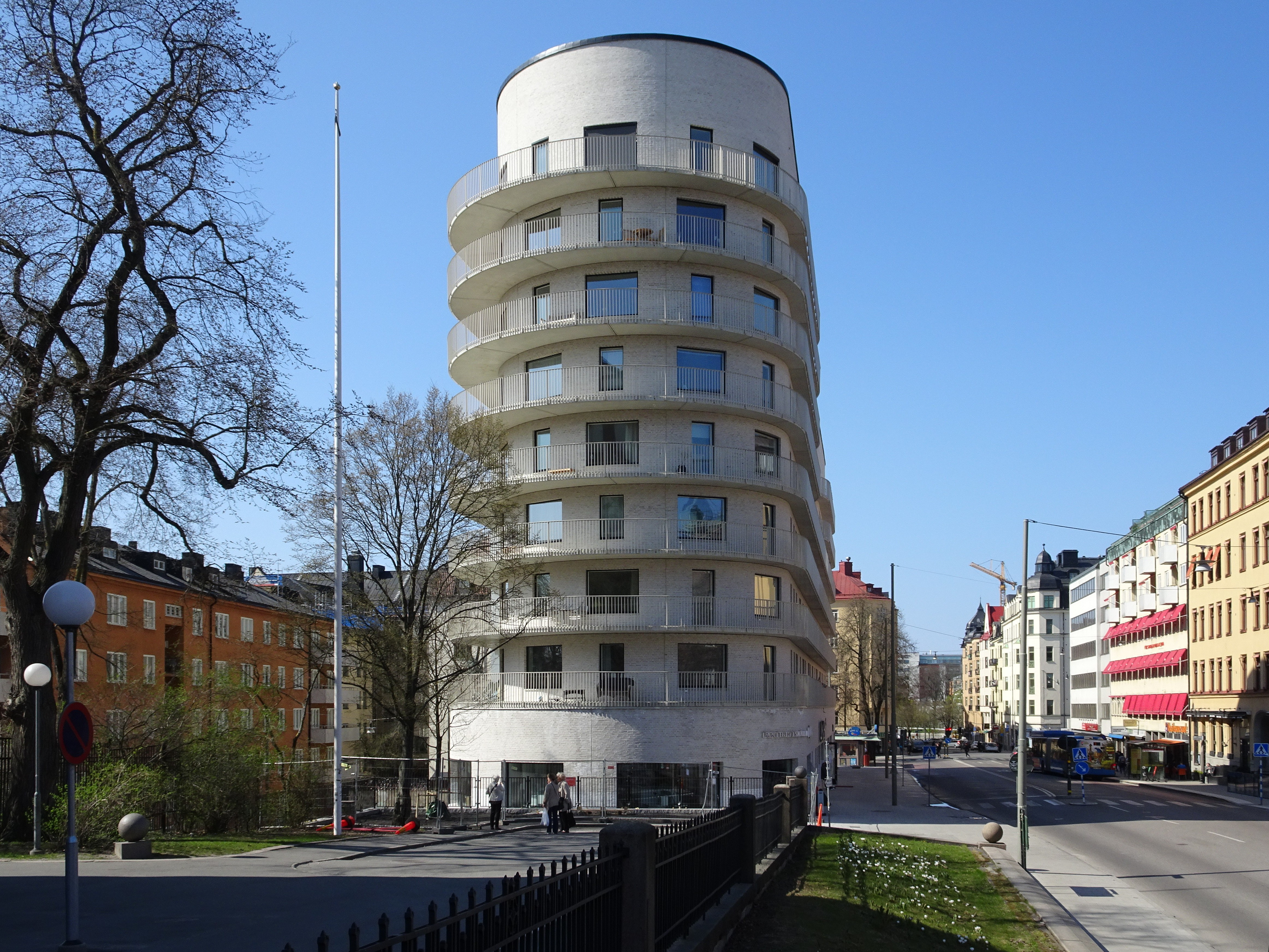 Fastighet: Basaren 1, Adress: Hantverkargatan 69-71, Arkitekt: Wingårdh Arkitektkontor AB. Byggherre: SKB